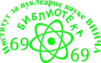 Библиотека Института за нуклеарне науке „Винча”